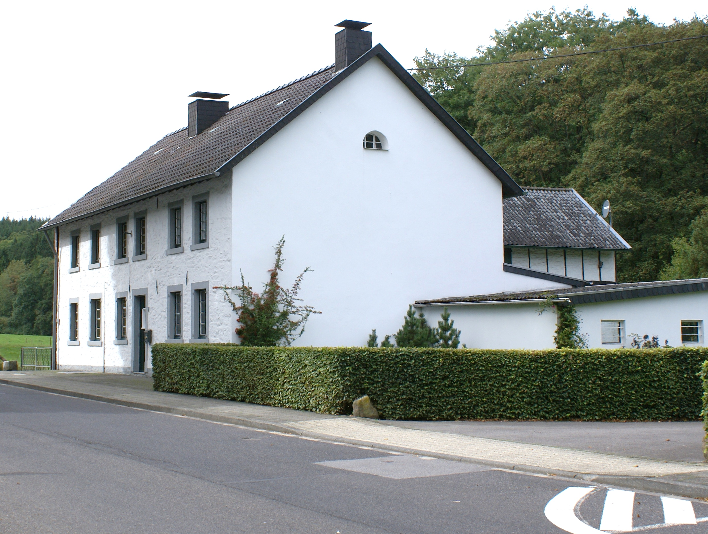 Roetgen-Mulartshütte Zweifaller Strasse 7This is a photograph of an architectural monument., no. 68